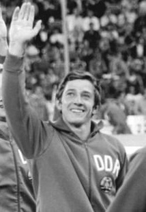 Reinhard Rychly